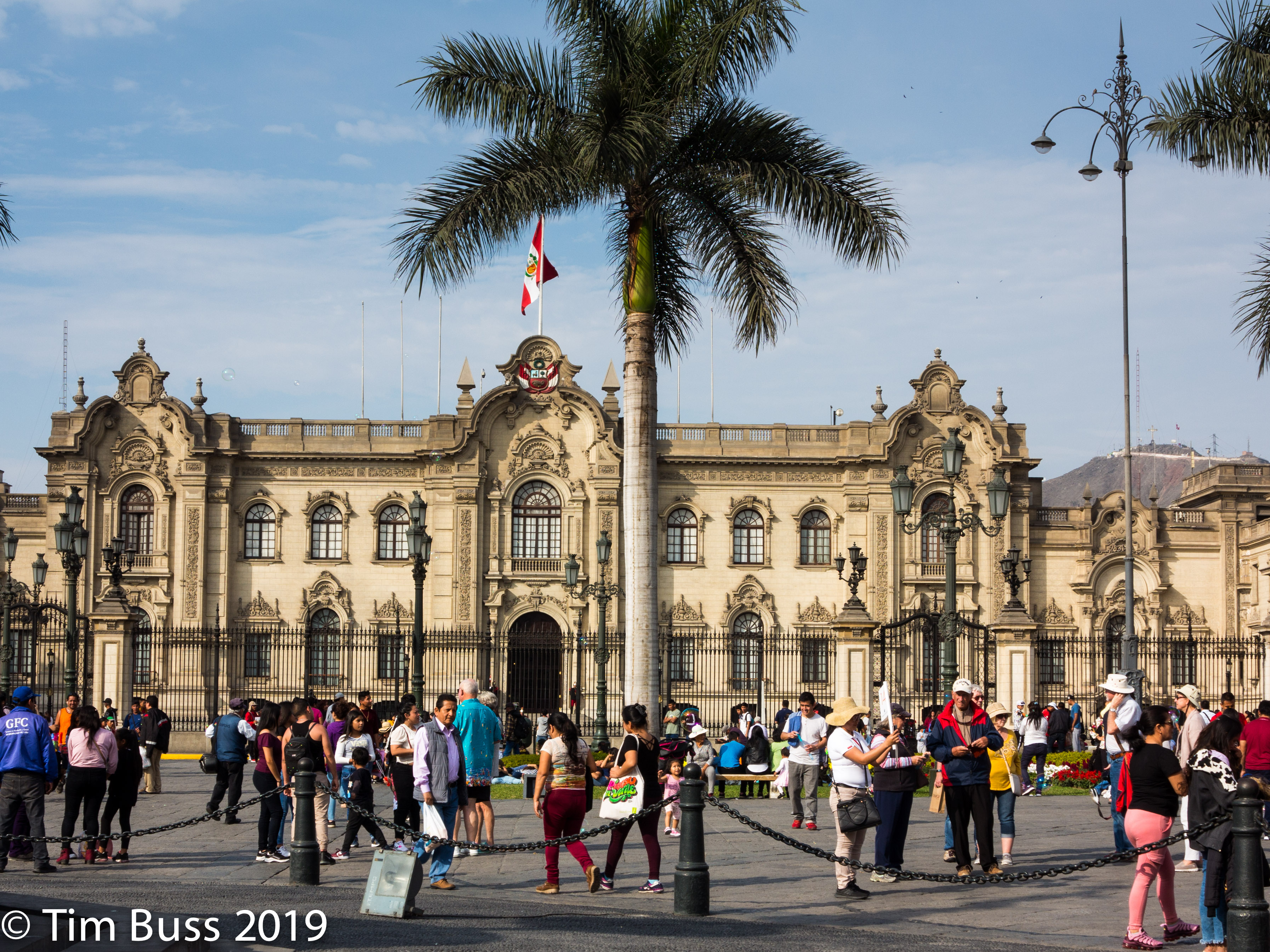 Lima, Peru